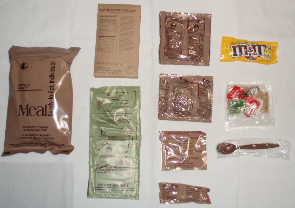 MRE